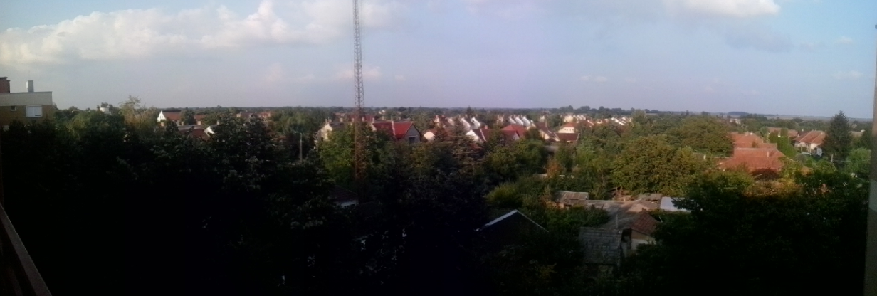 Mezőkovácsháza-Kertváros panorámaképe az Alkotmány utcai társasház felől nézve (Békés megye)